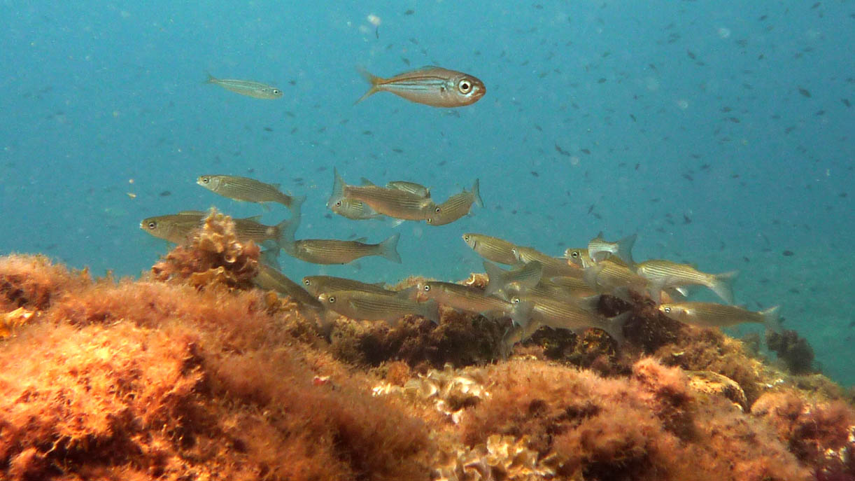 Boga (Boops boops) y banco de mújoles (Mugil cephalus) en El Portús en Cartagena (España).